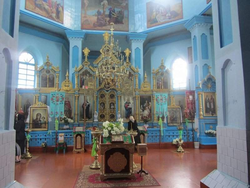 Царква Раства Прасвятой Багародзіцы ў Радчыцку Столінскага раёна Брэсцкай вобласці. Інтэр'ер